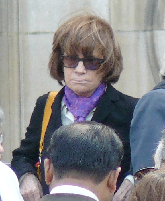 Nadine Trintignant, cinéaste et écrivaine, née en 1934, lors d'une apparition en soutien au mouvement des "Femmes en Blanc", le 18 mai 2010, sur le parvis de l'Hôtel de Ville de Paris.